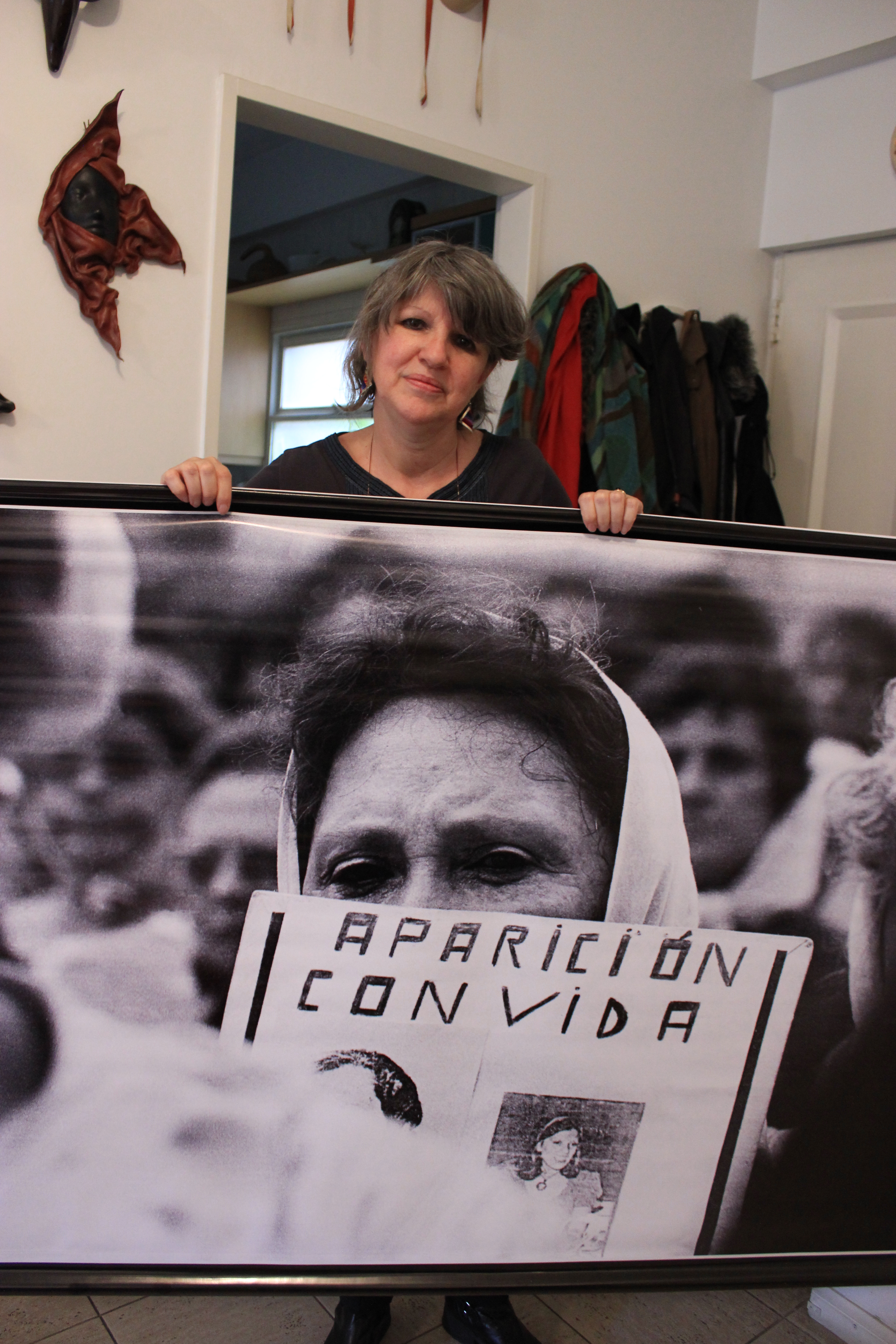 Mónica con una gigantografía de su trabajo.